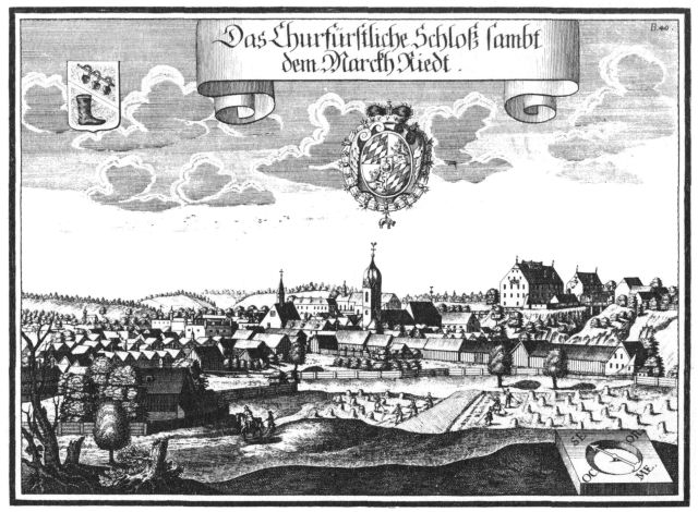 Ried im Innkreis auf einem Stich von Michael Wening aus dem Jahre 1721.